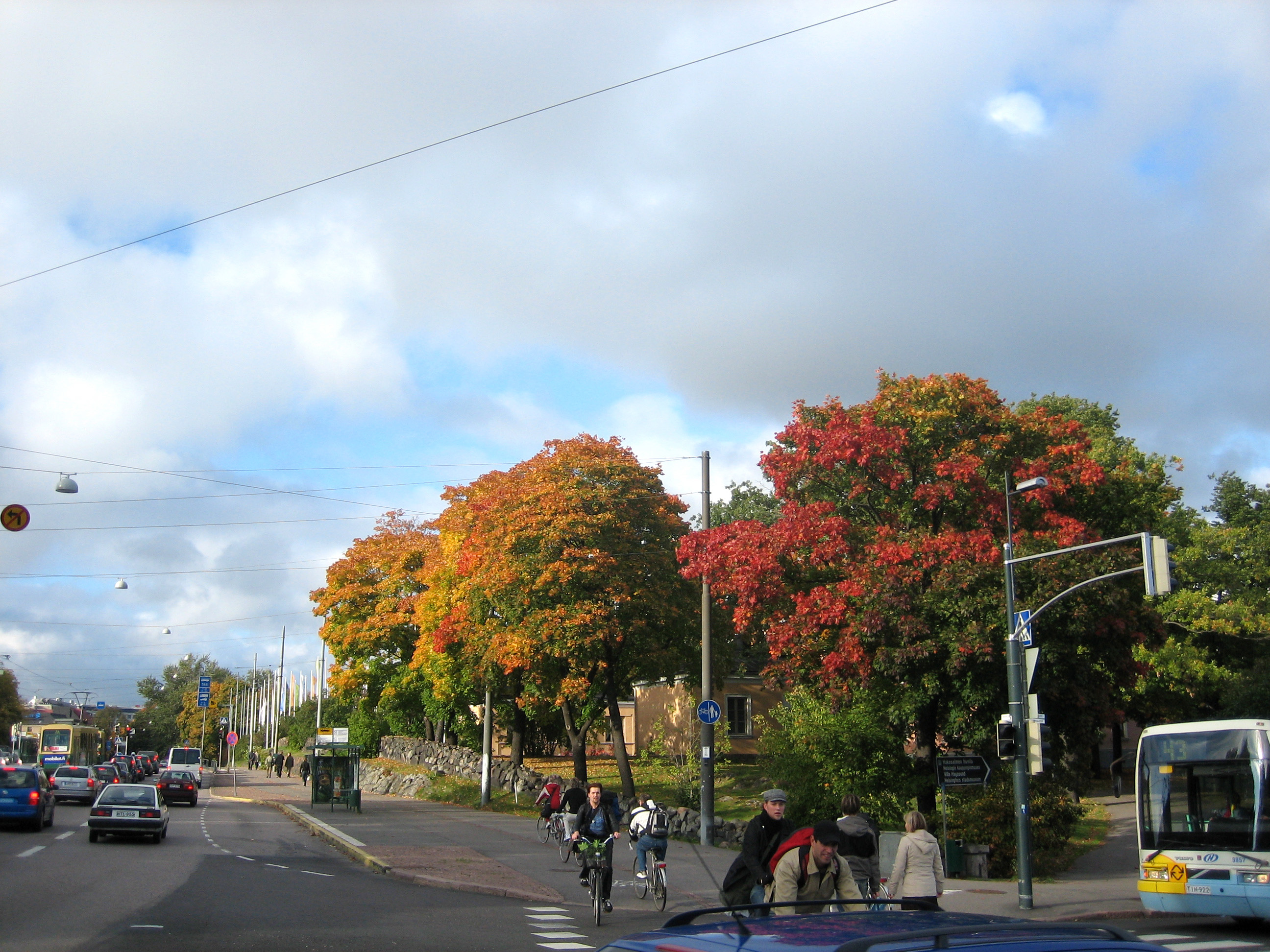 Syksyn värejä Mannerheimintie 13:n kohdalla, Karamzininkadun risteyksessä.